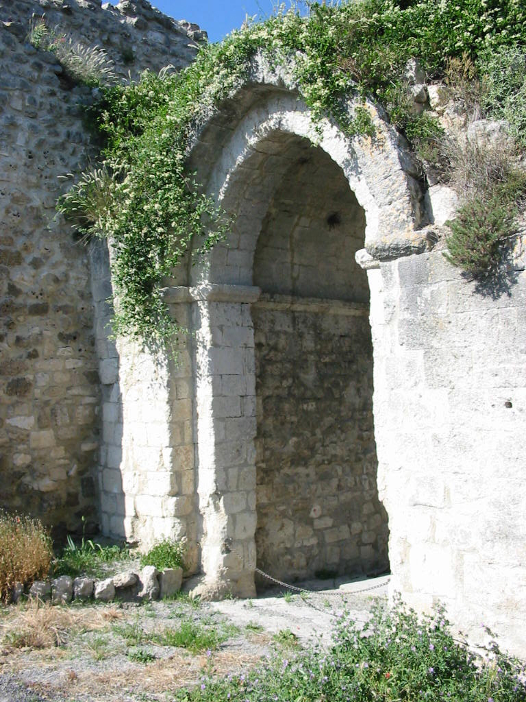 Porte médiévale de Reillanne (Alpes-de-Haute-Provence)